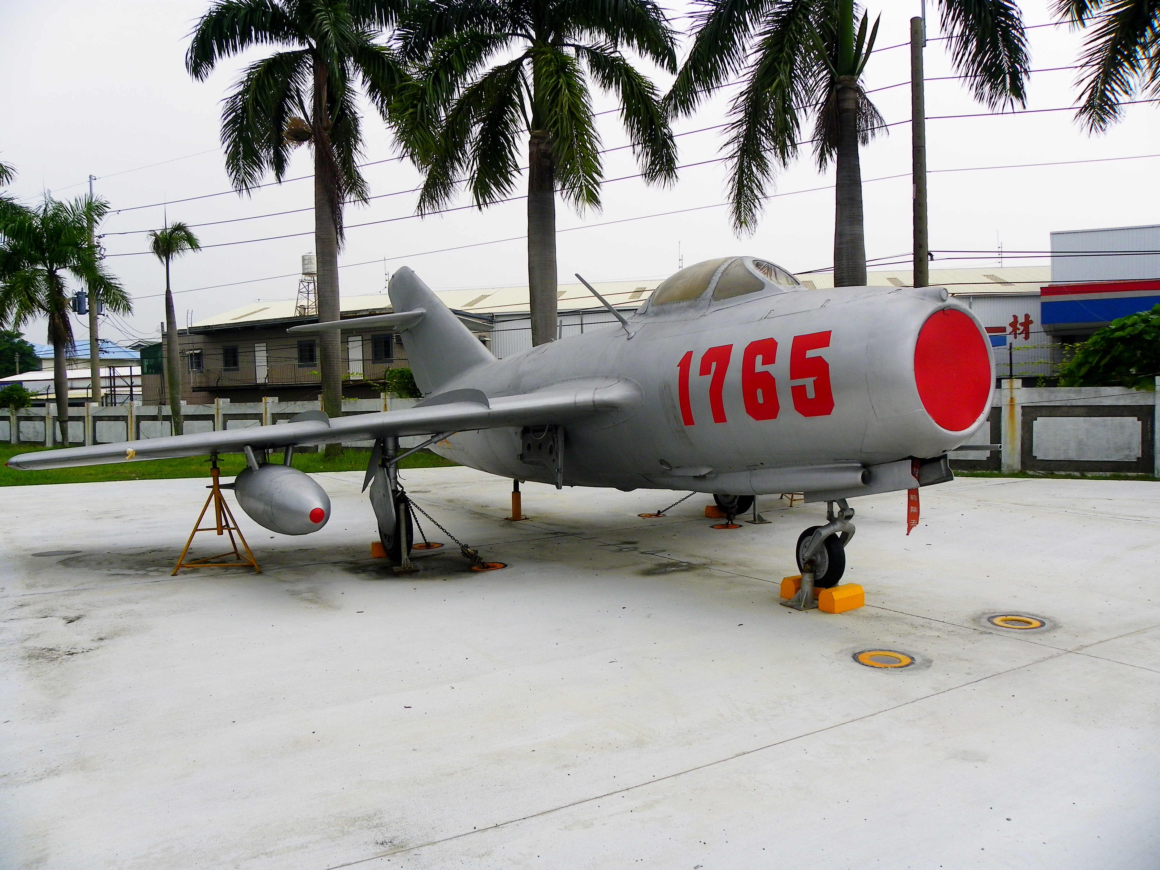 1962年3月3日，劉承司自浙江路橋機場駕機來歸之MiG-15戰鬥機。